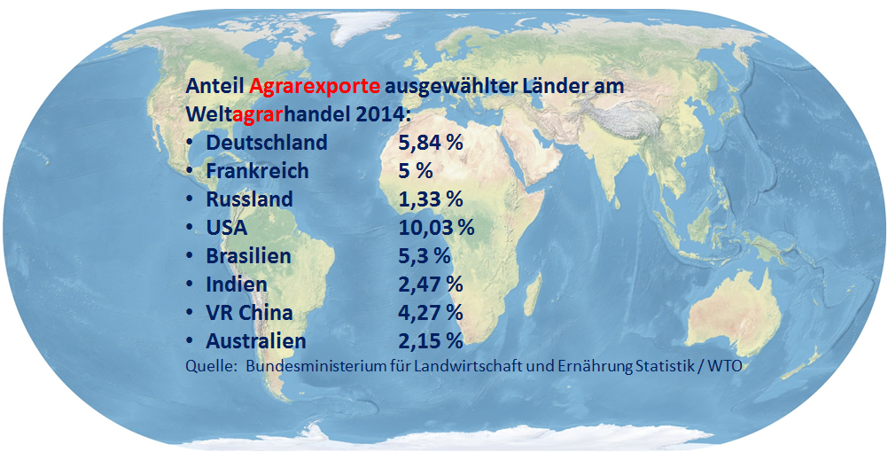 Das Bild beruht auf der Vorlage von Die angegeben Exportzahlen stammen vom Bundesministerium für Landwirtschaft und Ernährung und sind hier veröffentlicht